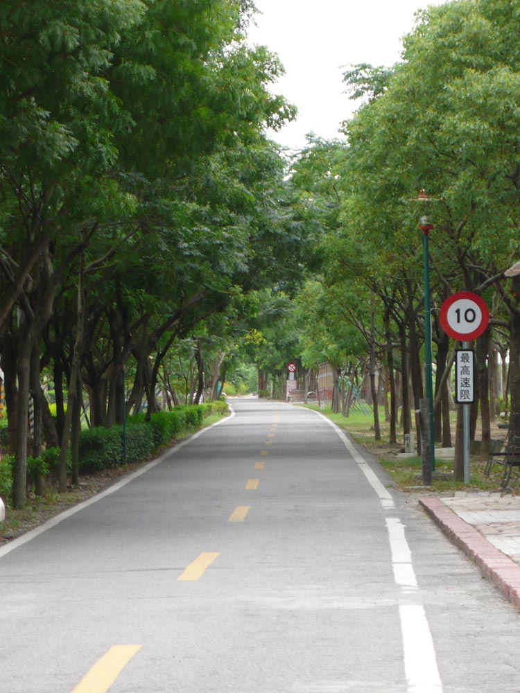 東豐自行車綠廊。